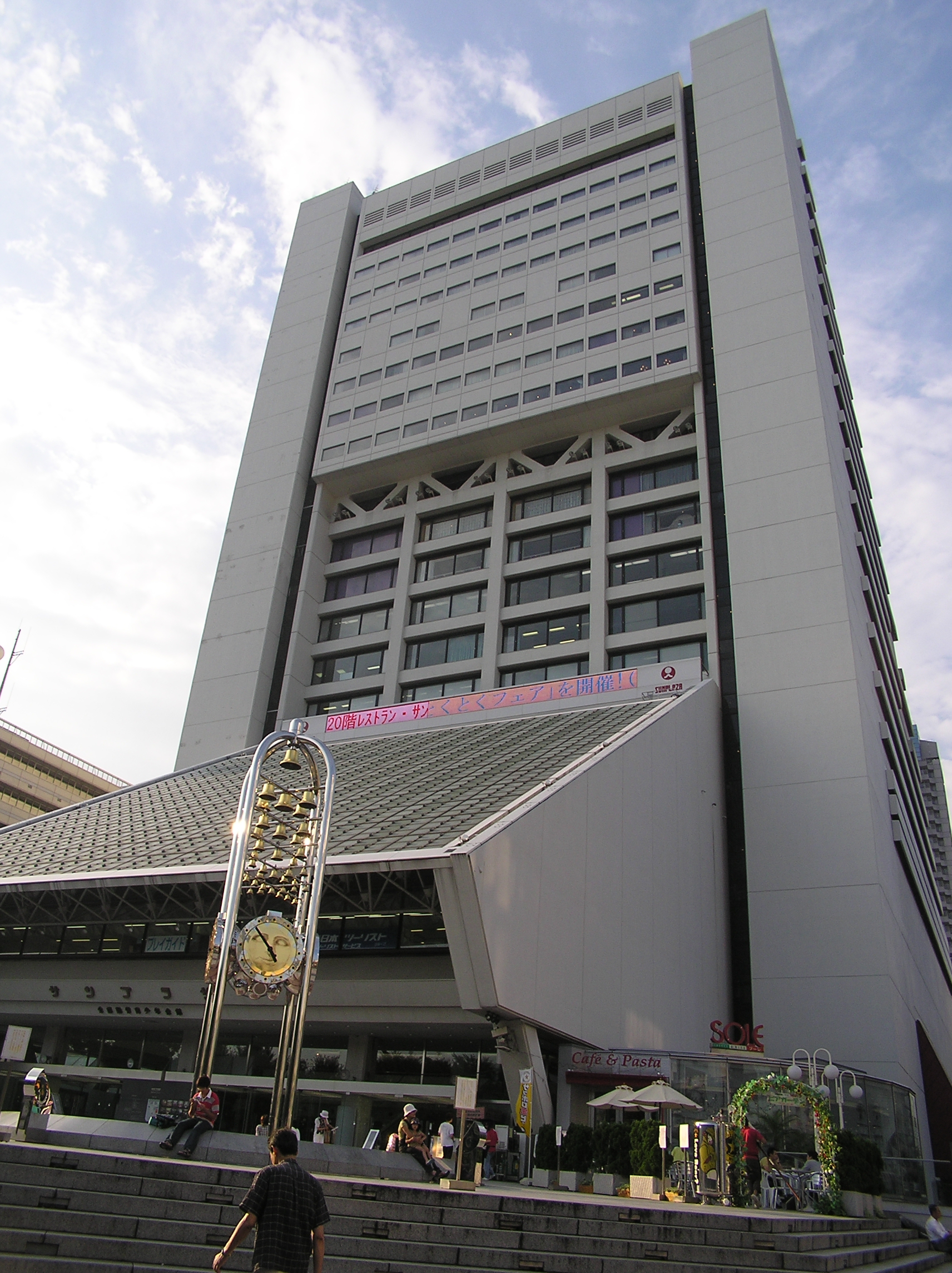 Nakano Sun Plaza